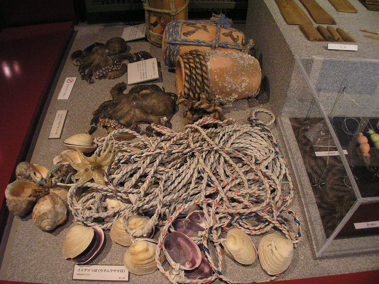 蛸壺の色々 明石市立博物館